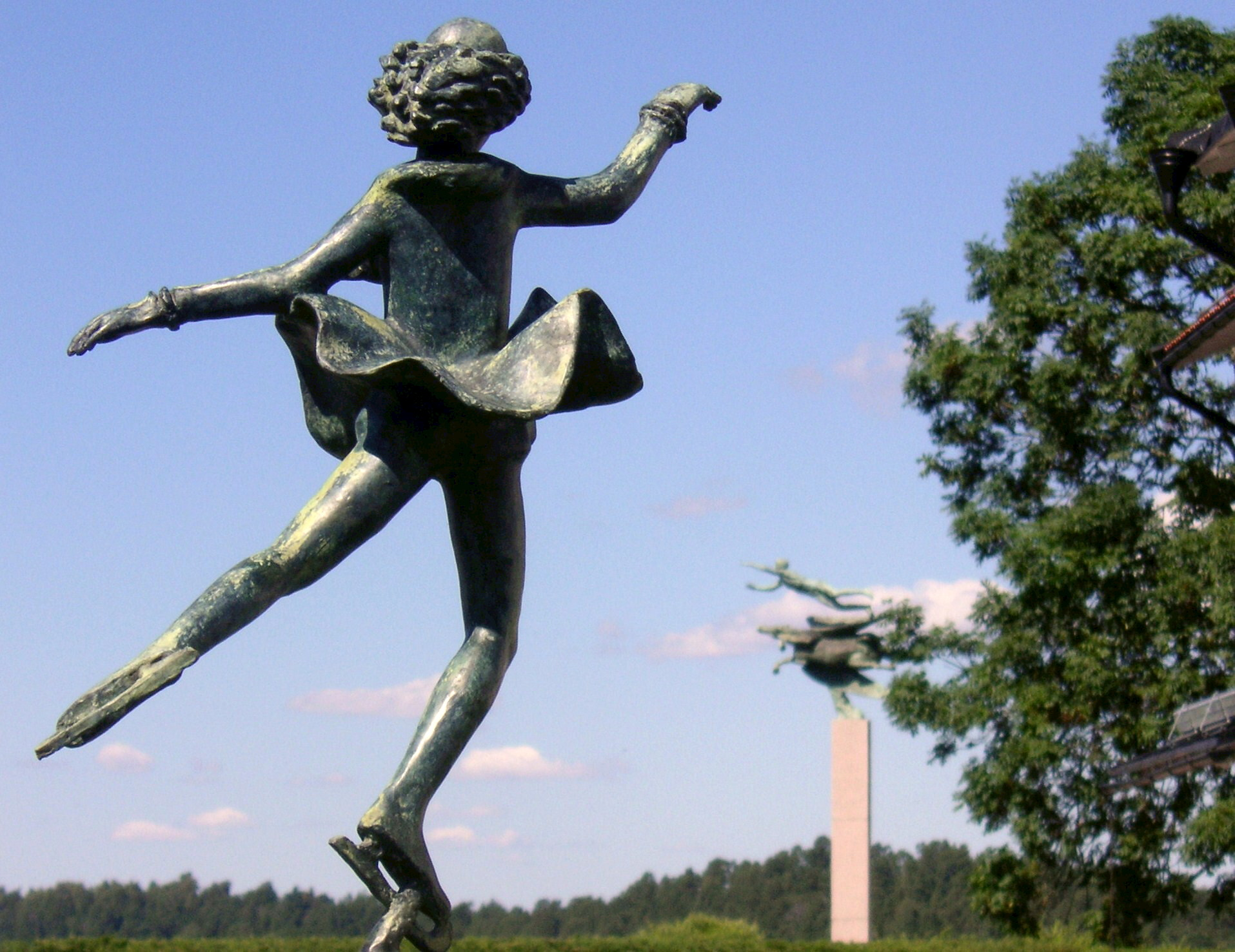 Skytteholm, kurs- och konferenscenter på Ekerö, Stockholms län. Carl Milles "Skridskoprinsessan" och i bakgrunden Carl Milles "Människan och Pegasus".